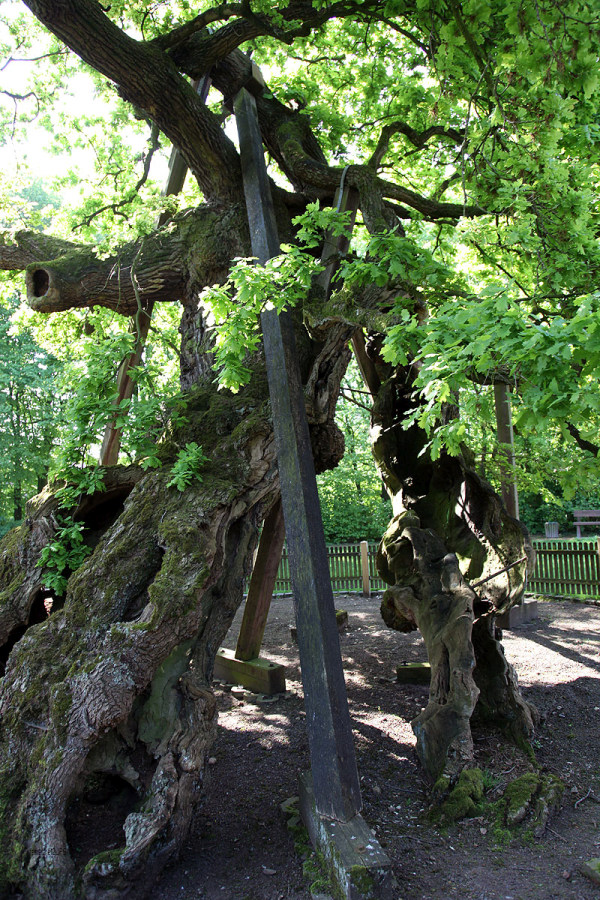 Blick auf den Stamm der 1500 Jahre alten Femeiche im westmünsterländischen Erle